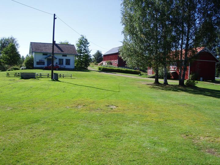 Gårdstunet på Halsnes.